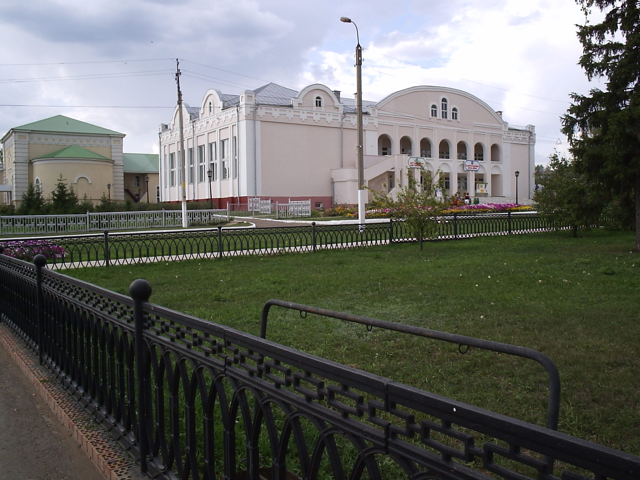 Дом культуры с. Черемшан